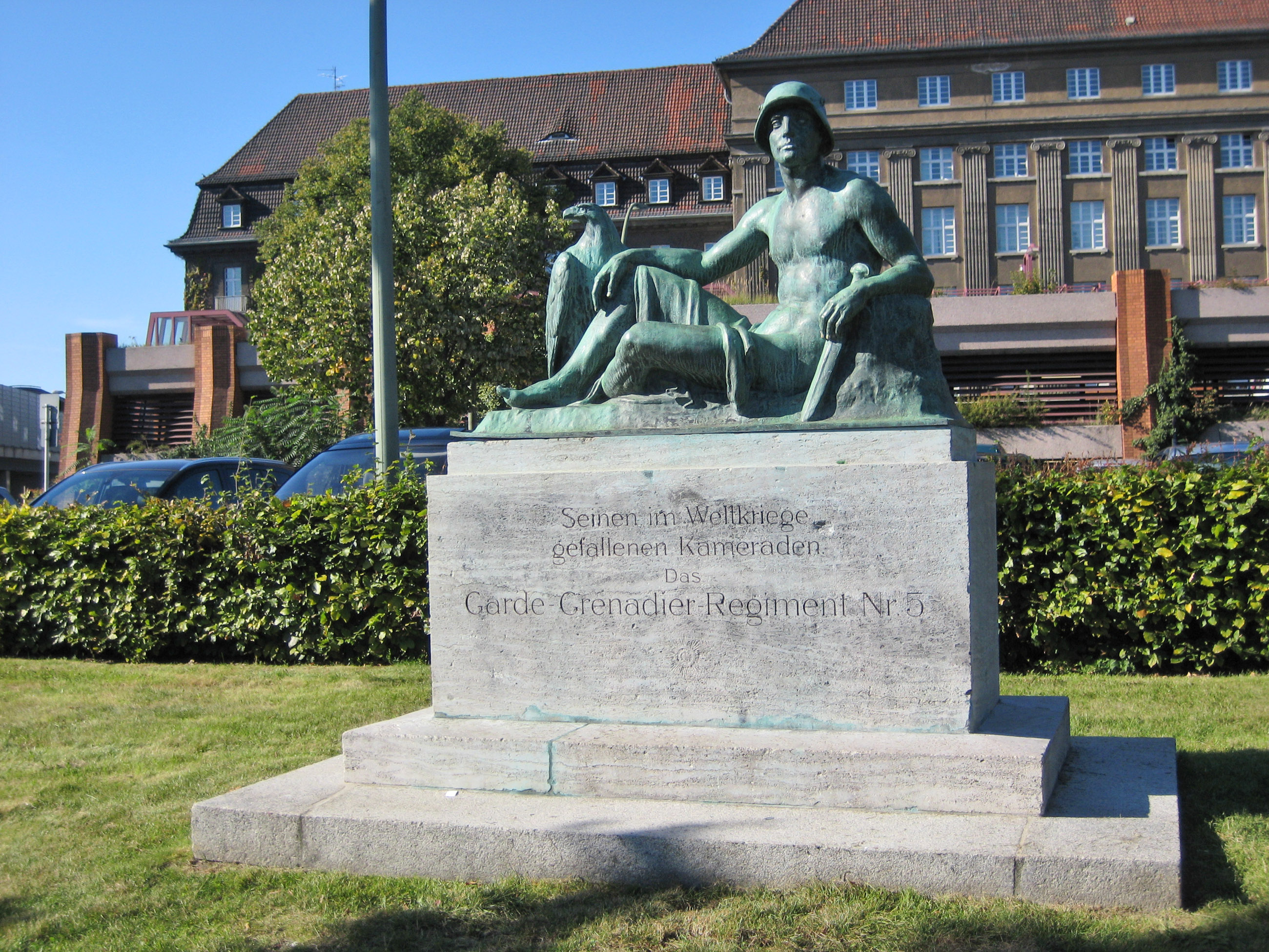 Denkmal des Garde-Grenadier-Regiments Nr. 5